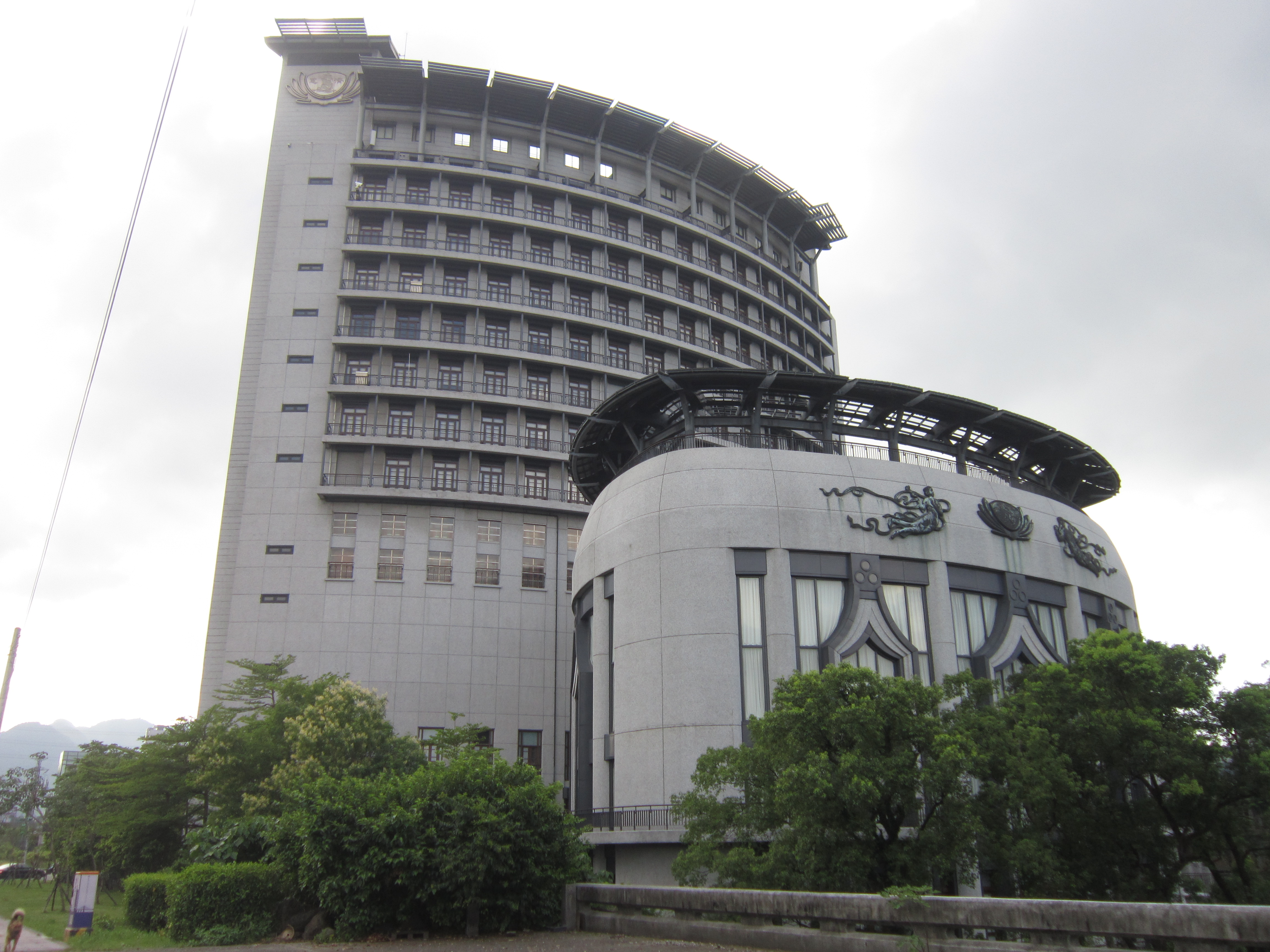 慈濟關渡園區人文志業中心一景。